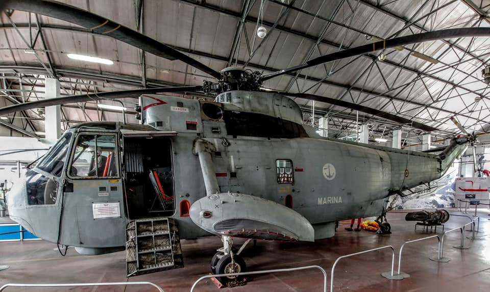 SH 3D Sea king della Marina militare italiana.